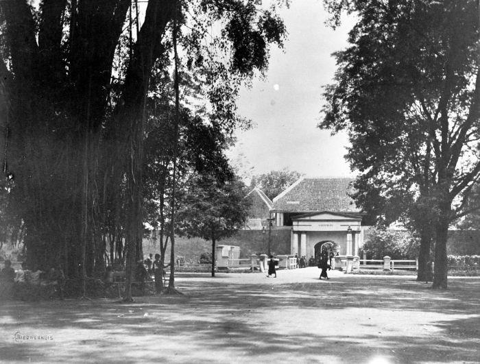 Repronegatief. Fort Vredeburg, Djogja